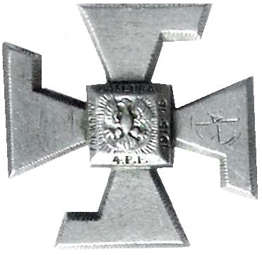 Odznaka 4. Pułku Piechoty.